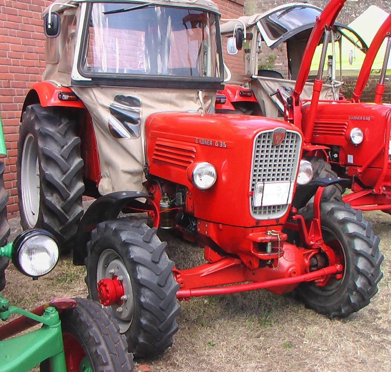 G35 mit Allradantrieb und Verdeck